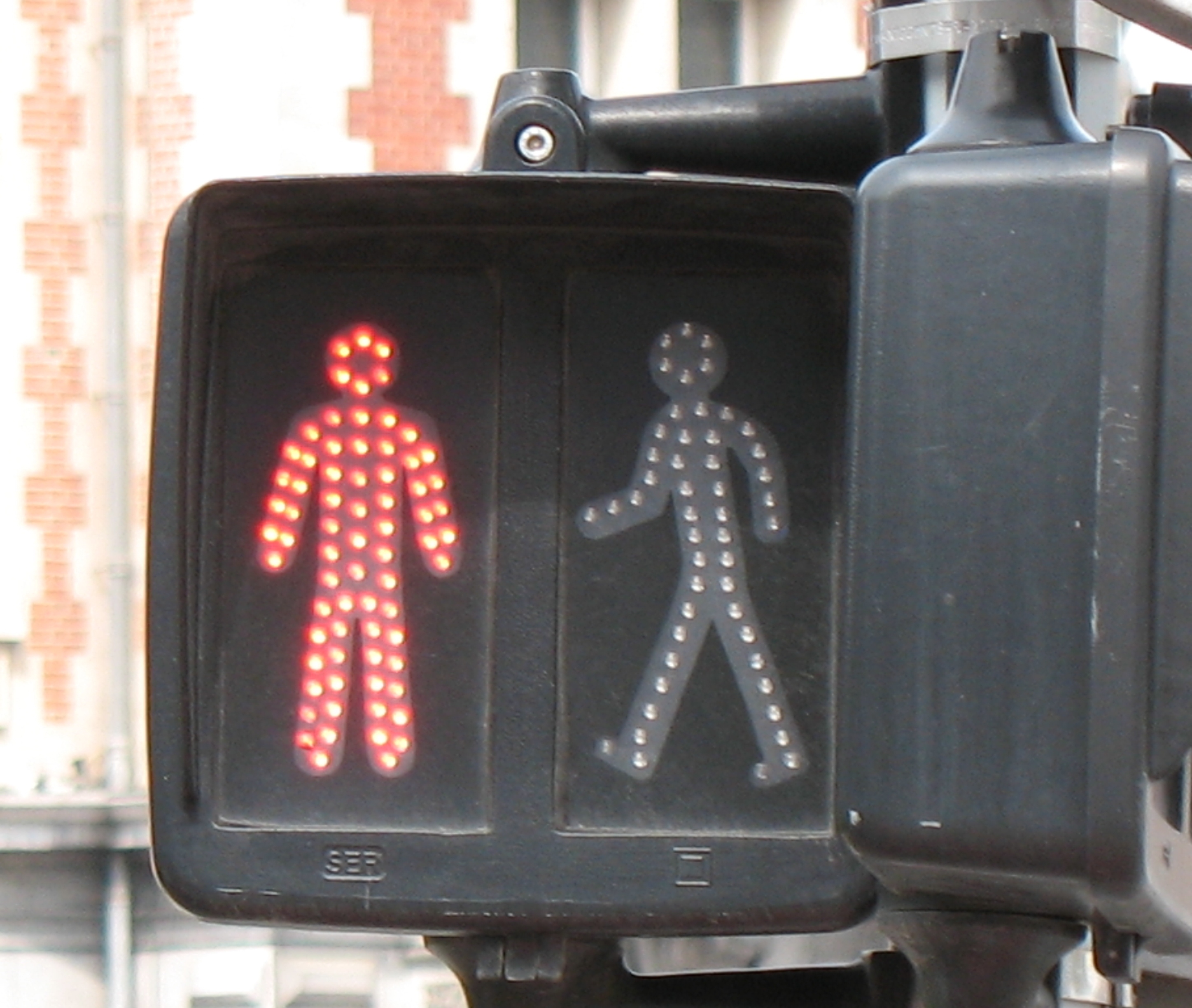 Traffic lights in France (Fußgängerampel in Frankreich)